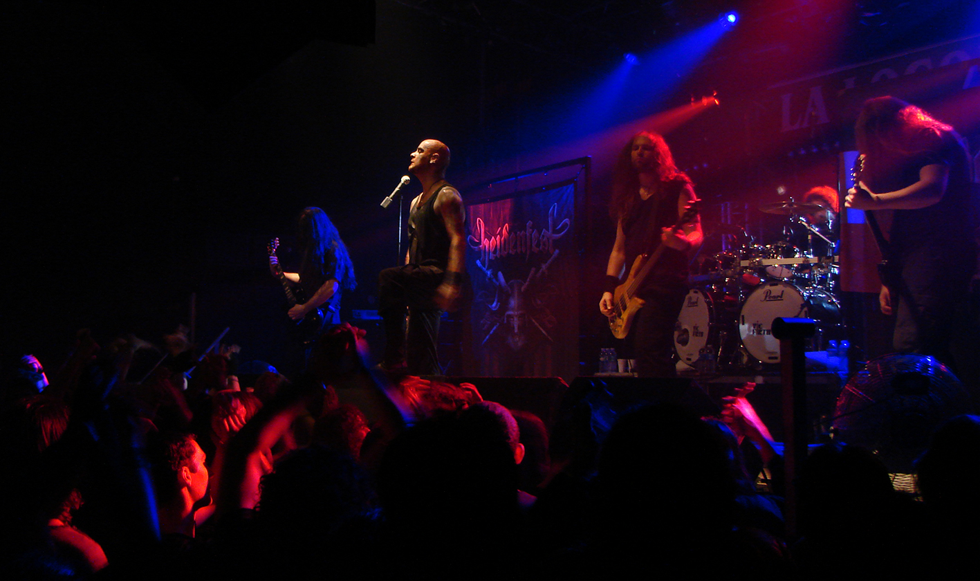 Primordial en concert à la Locomotive, à Paris, pendant le Heidenfest Tour 2008.